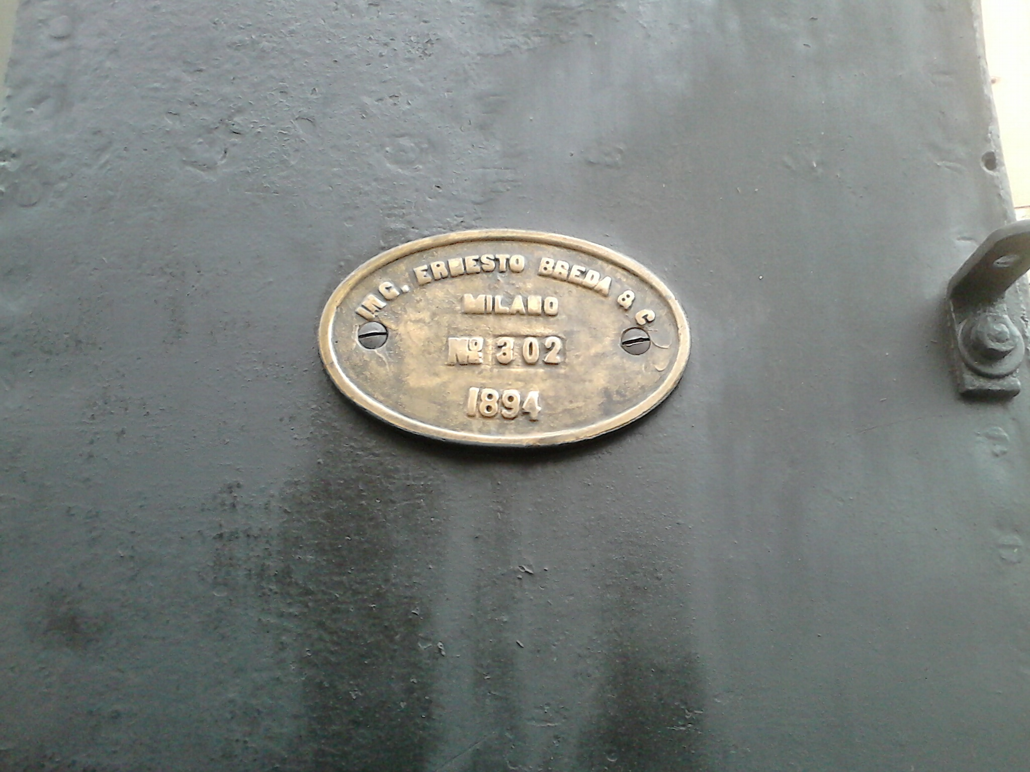 Locomotiva a vapore n.10, Mascali della Ferrovia Circumetnea di Catania